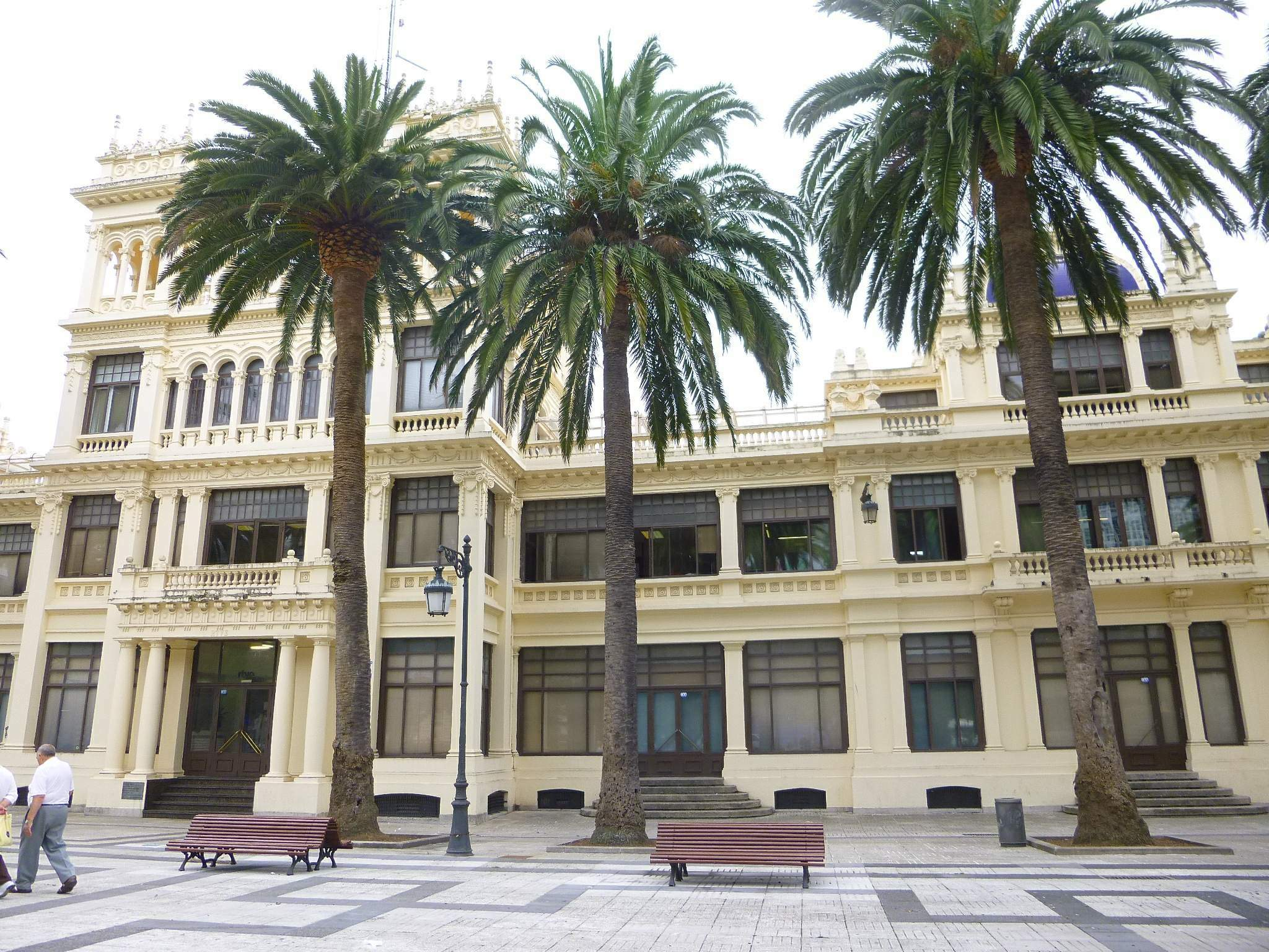 A Coruña - La Terraza